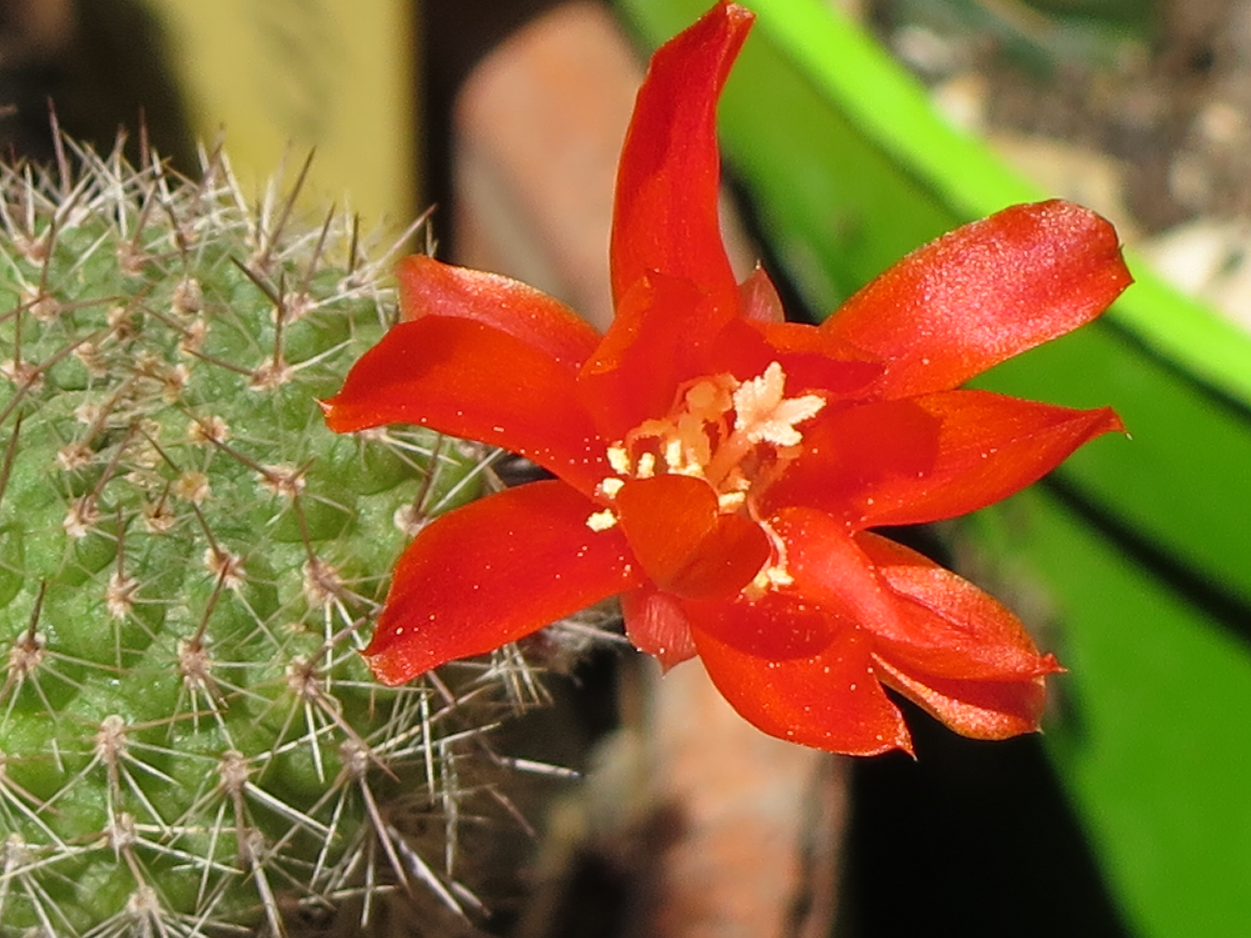 Il fiore della rebutia heliosa var. cajasensis